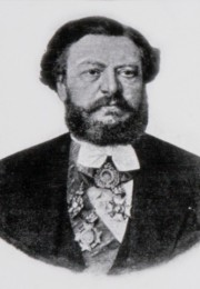 Dimitrie Ghica, Prime Minister of Romania